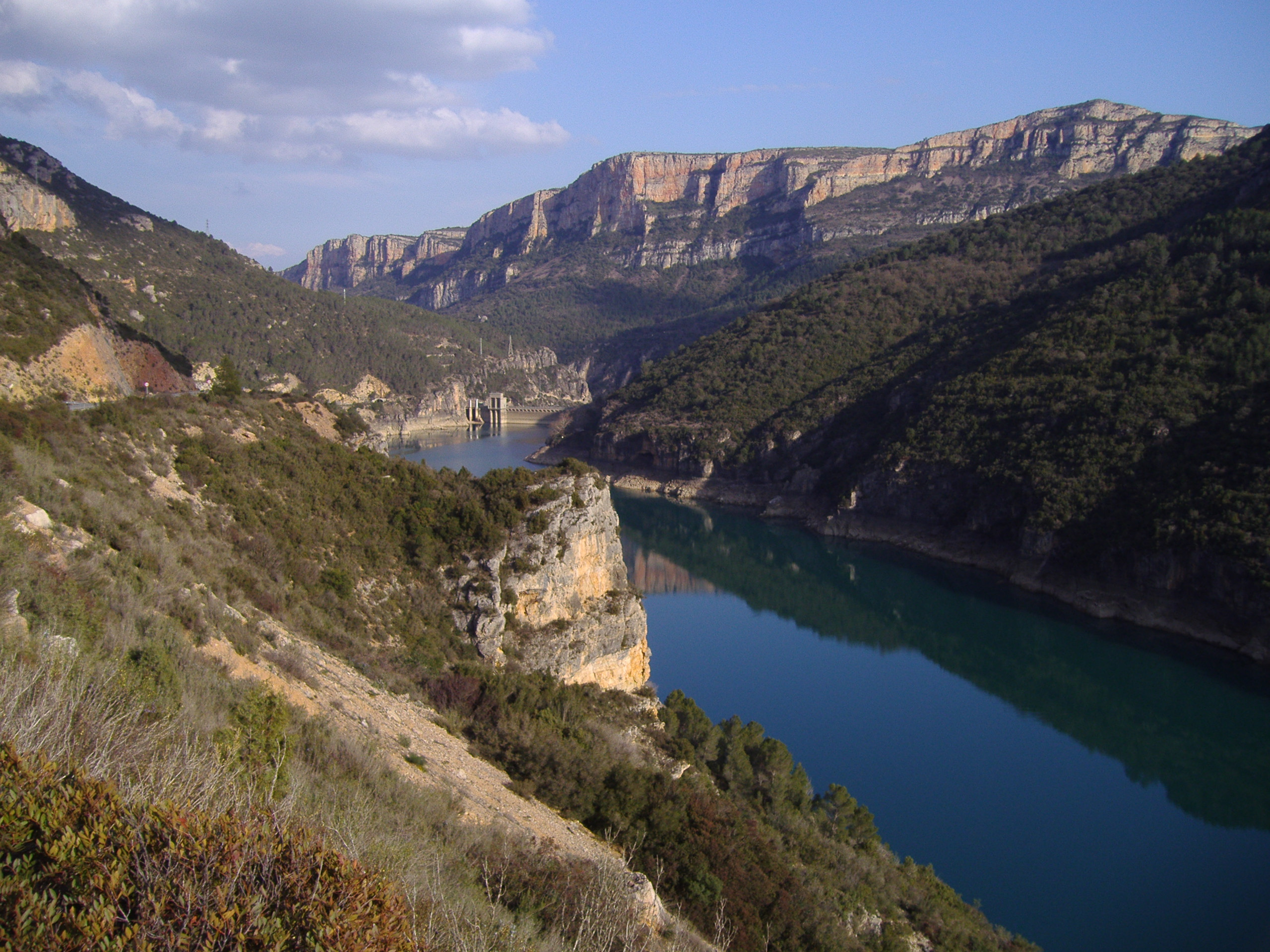 Pantano de Camarasa (Lleida)